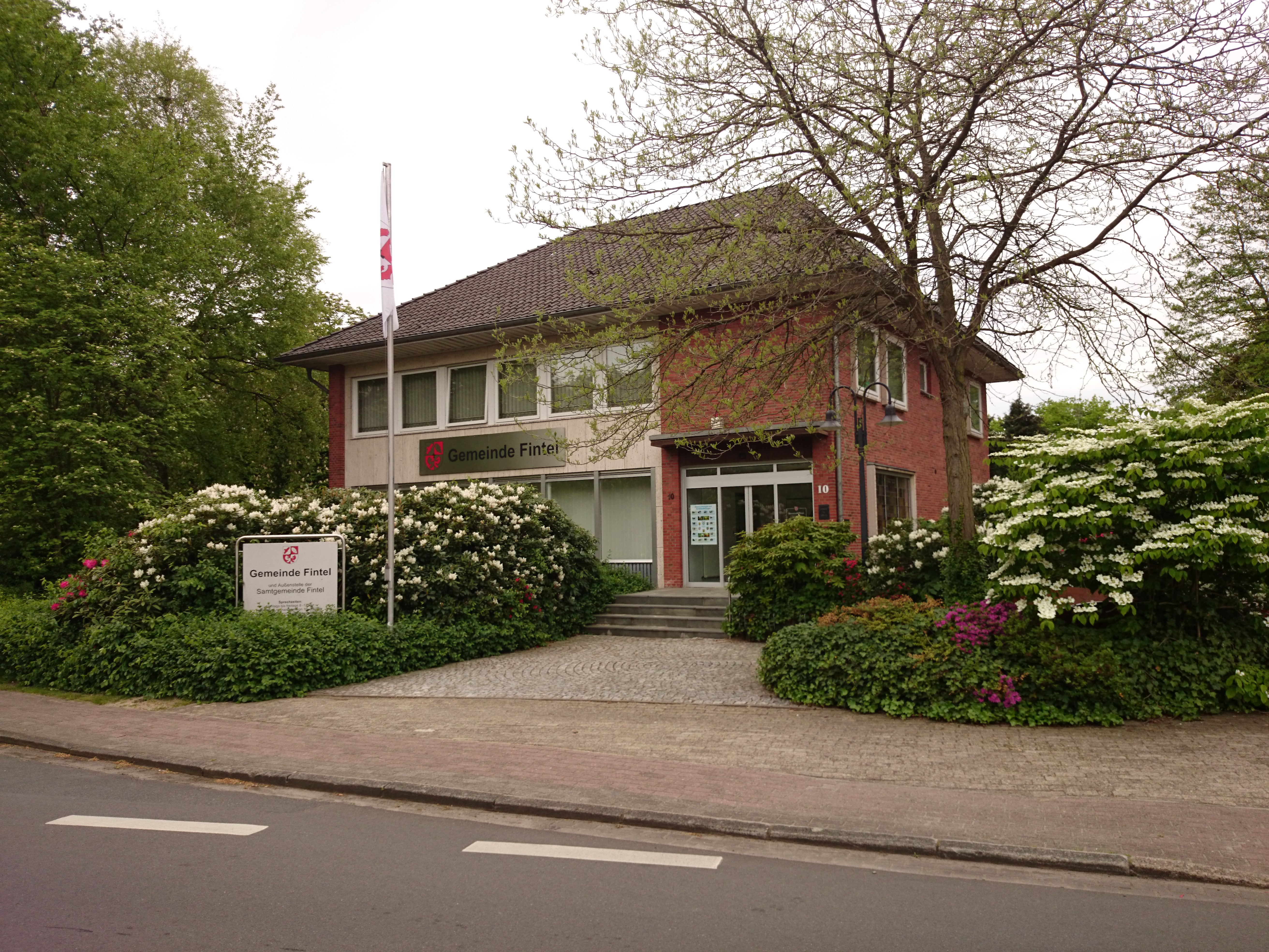 Die Verwaltung der Gemeinde Fintel, Rotenburger Straße 10.